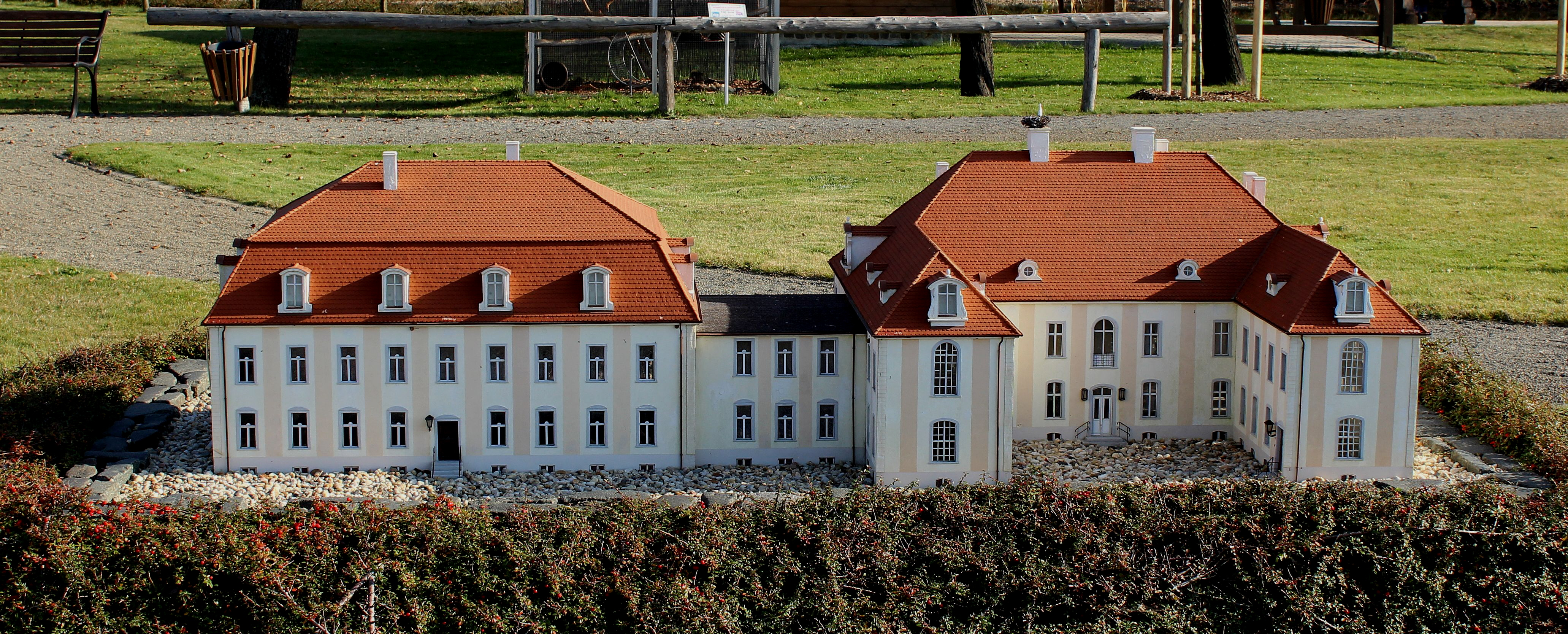 Das Modell des Schlosses Mückenberg im Miniaturenpark Elsterwerda.